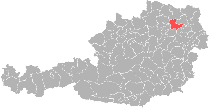 Bezirk Tulln in Österreich